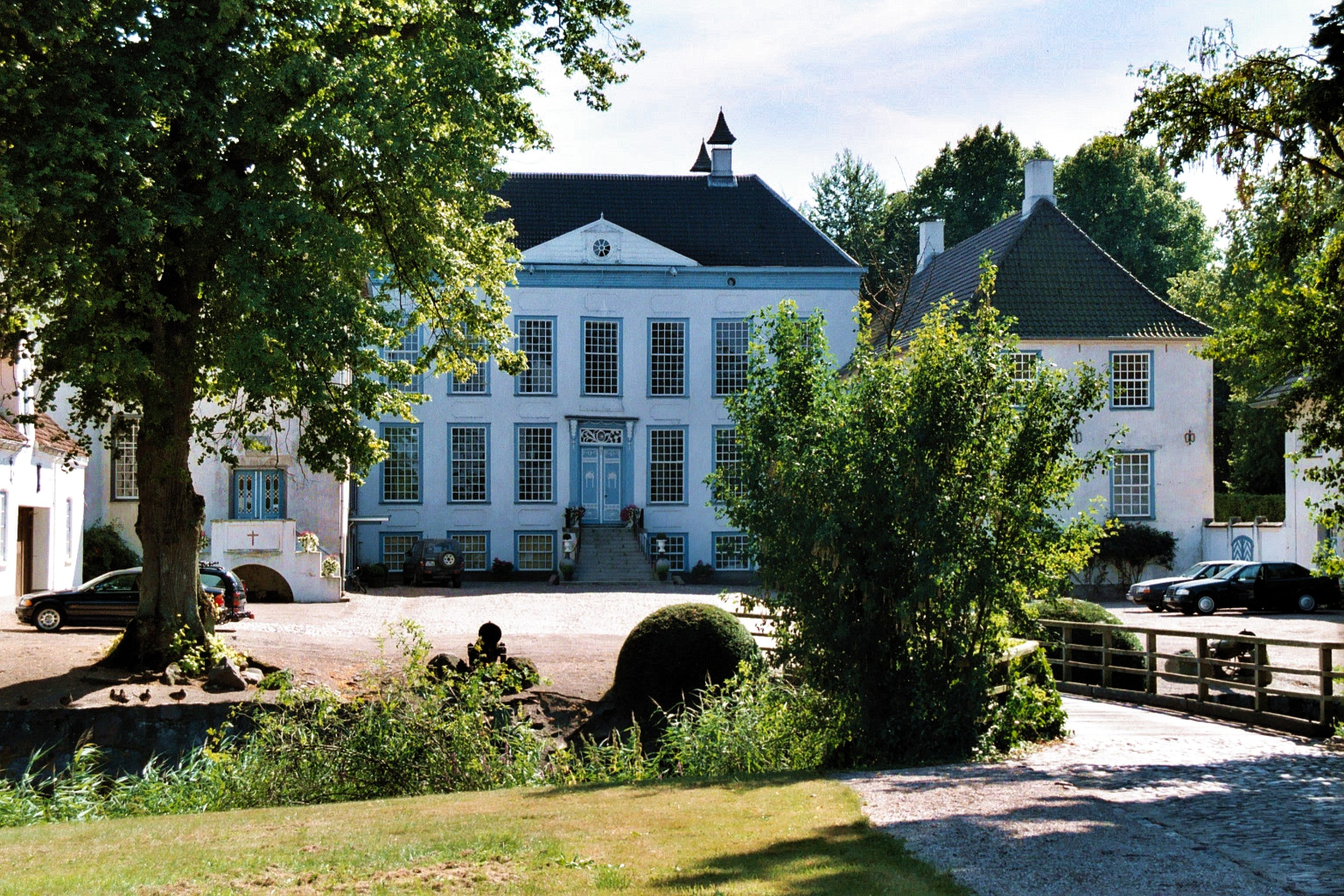 Das Geltinger Schloss